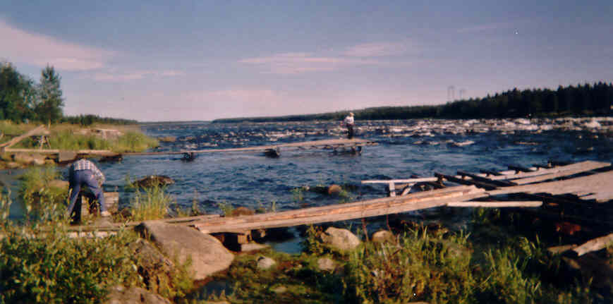 Tornionjoen Kukkolankoski heinäkuussa 2004.